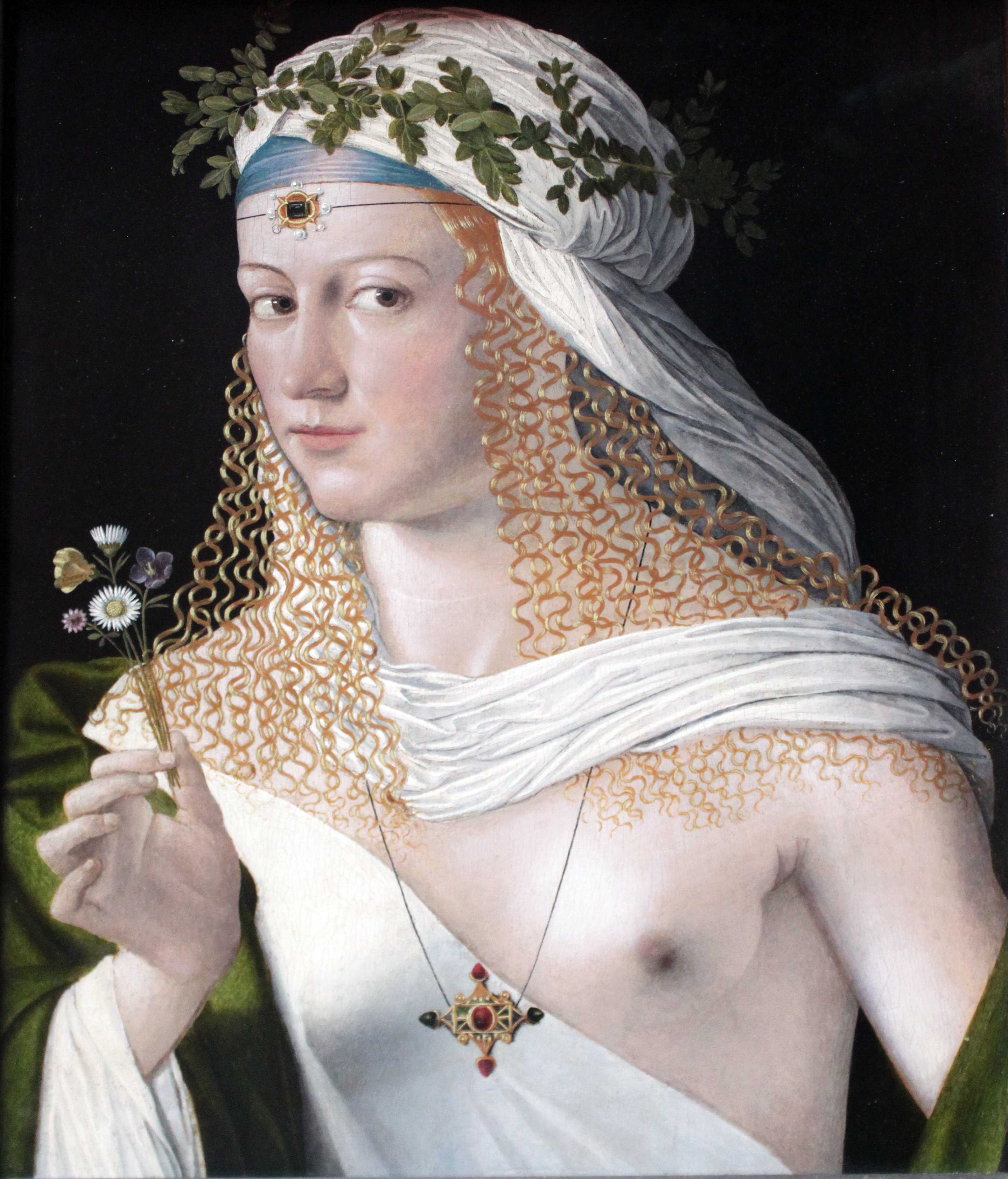 Traditionell gilt das Werk als Bildnis der Lucretia Borgia, Tochter von Papst Alexander VI.. Es zeigt eine unbekannte Dame in Gestalt der antiken Frühlingsgöttin Flora.